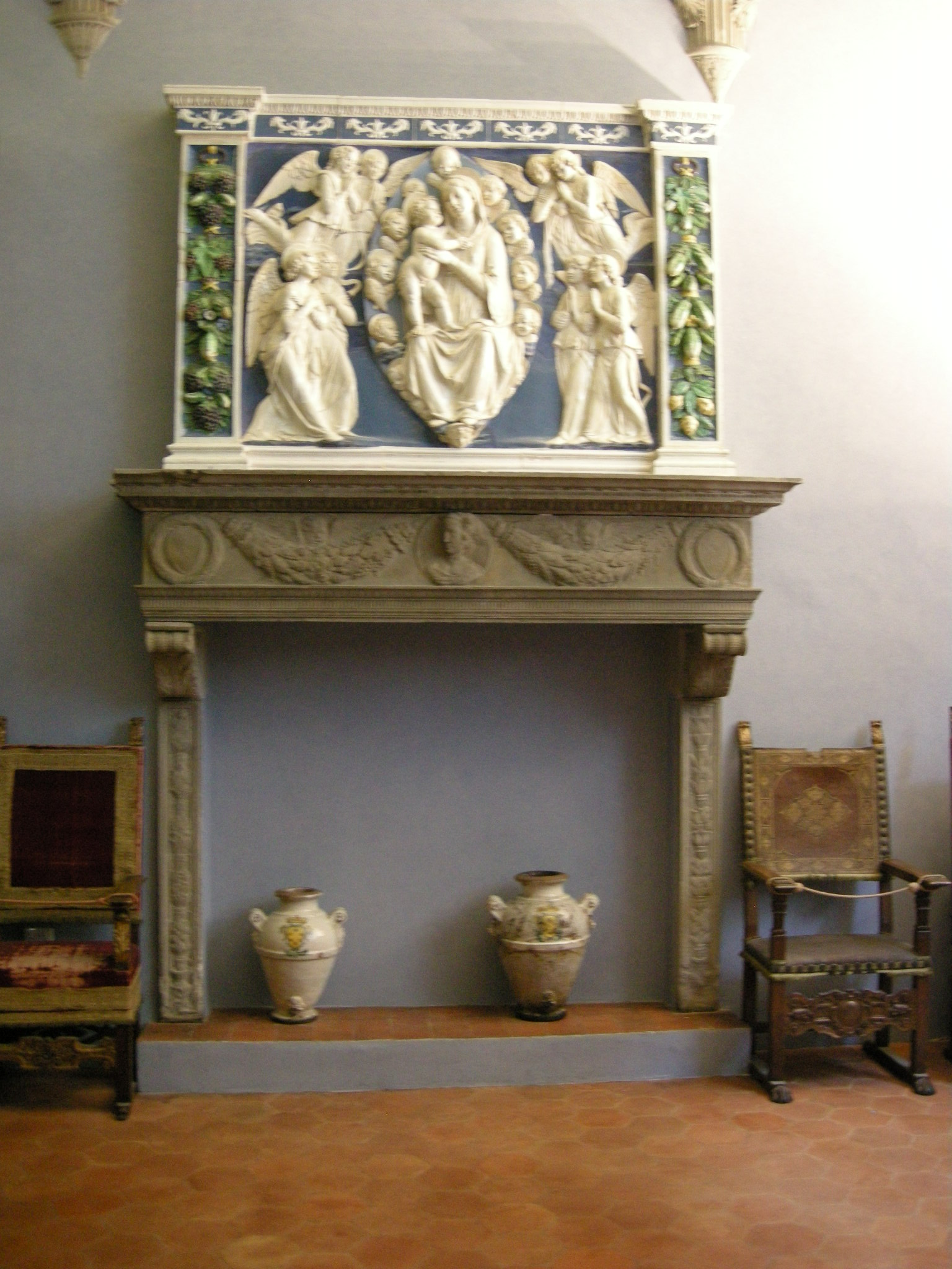 Museo bardini, sala 3 2